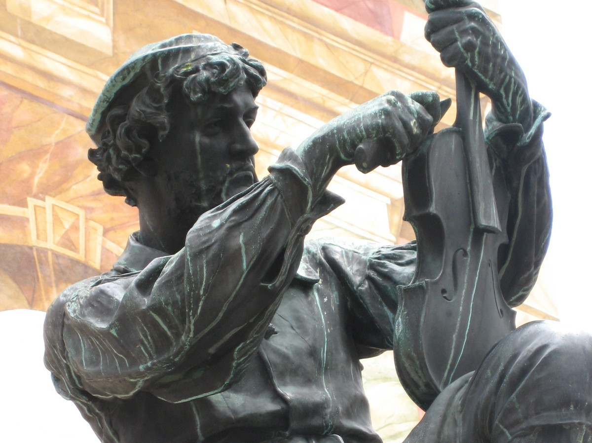 Denkmal für den Geigenbauer Matthias Klotz in Mittenwald, vor der Kirche St. Peter und Paul